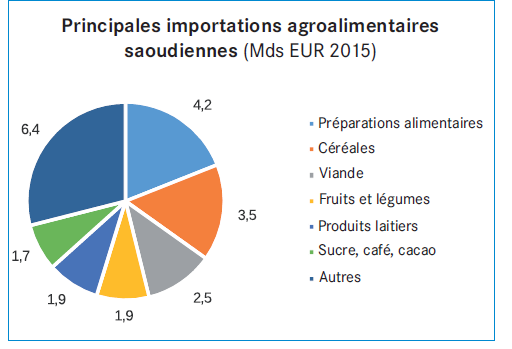 Echanges Commerciaux en Arabie saoudite